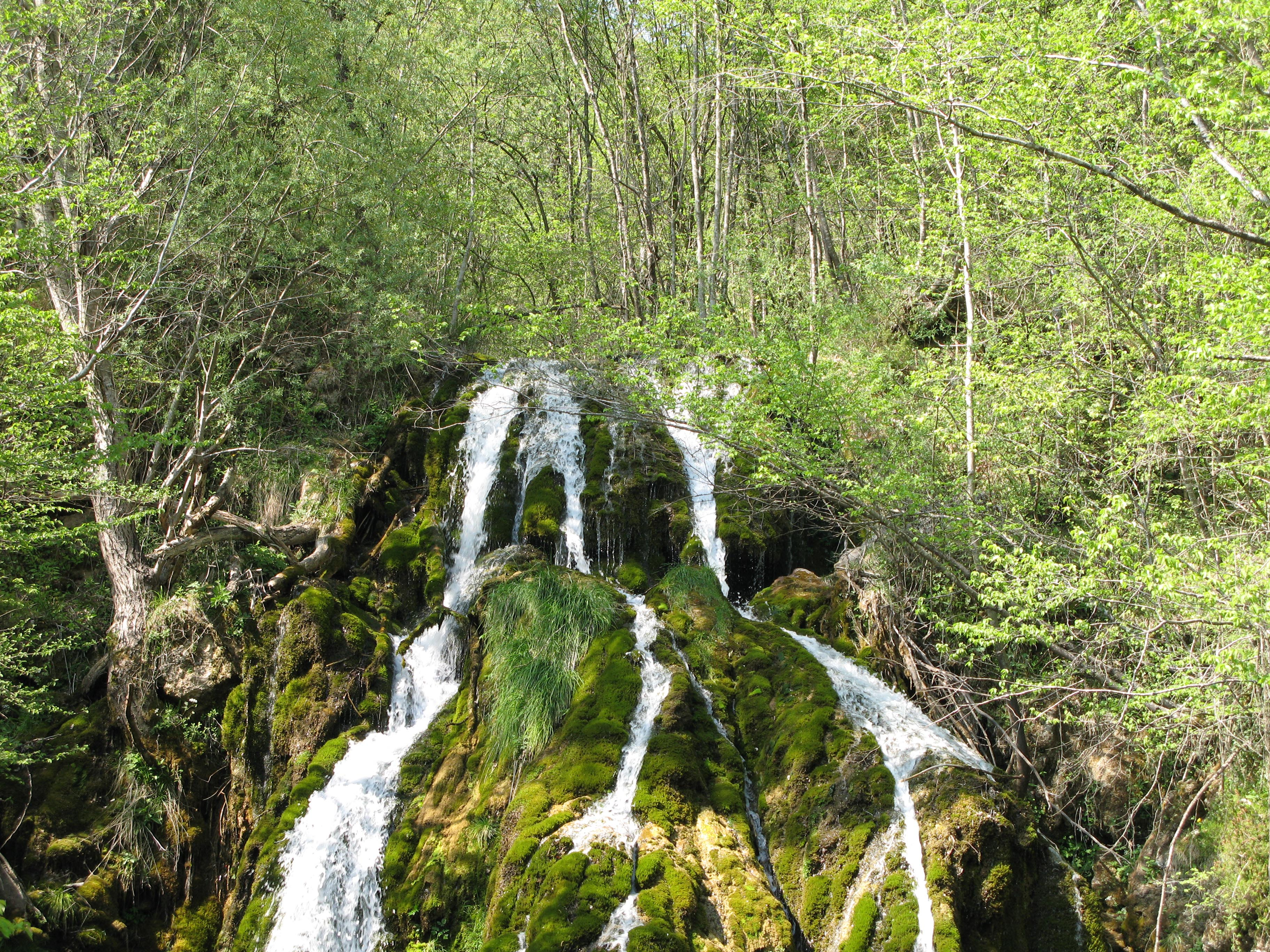 Drugi slap Nežice ob glavni cesti Kočevje-Petrina.